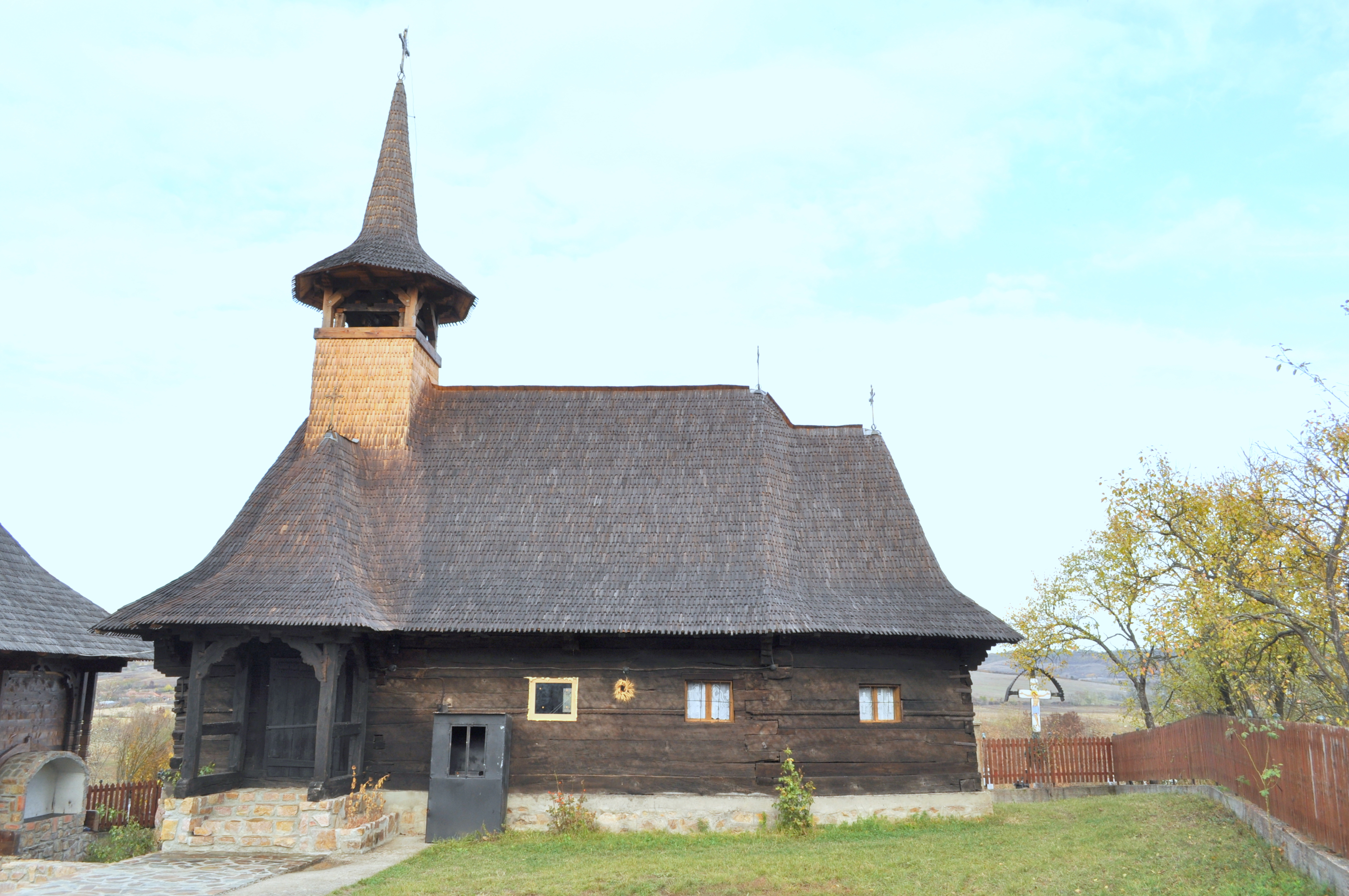 Biserica de lemn „Sf. Teodor Tiron" din Brătești, județul Bihor